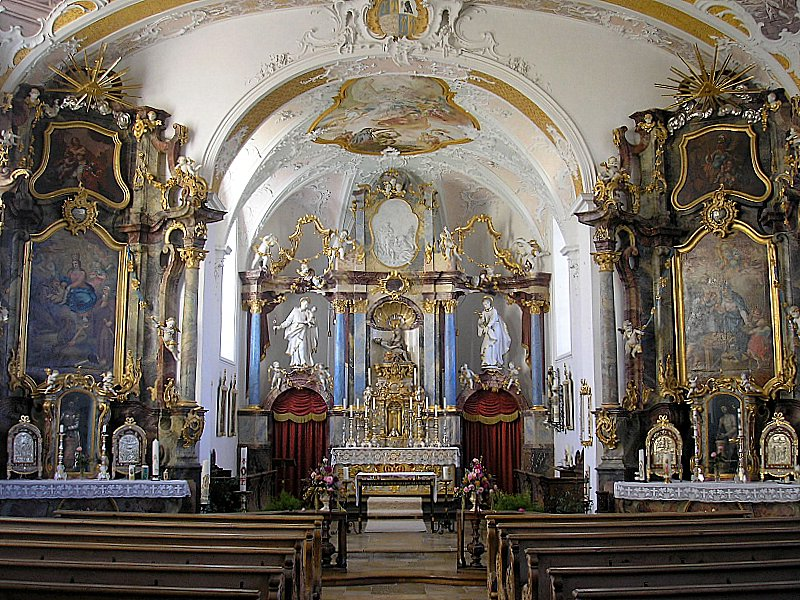 Wallfahrtskirche Maria Kappel (Schmiechen, Landkreis-Aichach-Friedberg, Bayerisch-Schwaben). Innenansicht. Eigene Aufnahme, Nov. 2006 / Pilgrimage church Maria Kappel near Schmiechen, Bavaria, Germany). Interior. Own photo, Nov. 2006